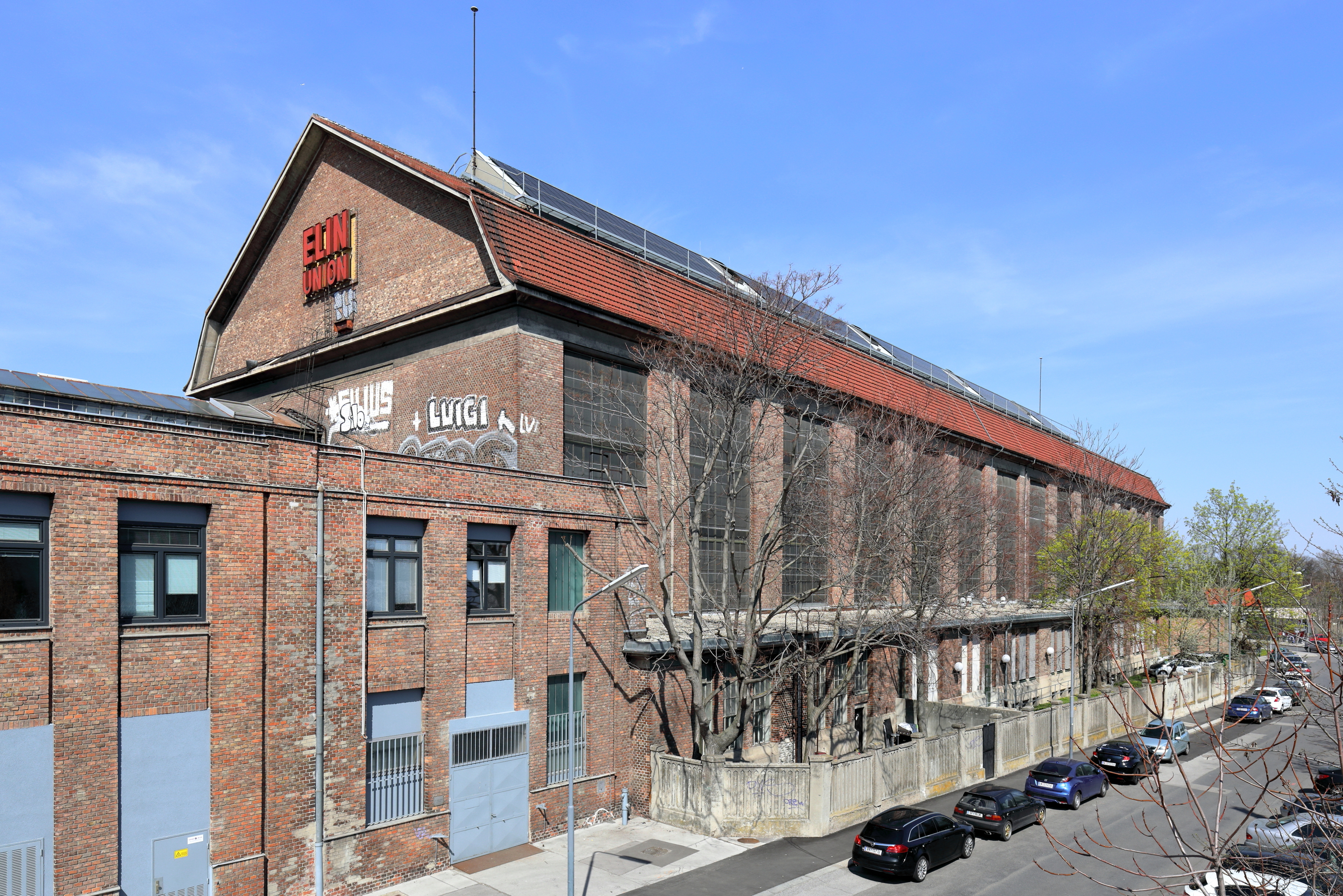 Die Großmaschinenhalle der ehemaligen A.E.G-Union Elektrizitäts-Gesellschaft (später Elin-Union A.G.) an der Adresse Dr.-Otto-Neurath-Gasse 7 in Hirschstetten, ein Bezirksteil des 22. Wiener Gemeindebezirkes Donaustadt. Die monumentale langgestreckte Ständerhalle mit Mansardsatteldach wurde von 1917 bis 1921 nach Plänen des Stuttgarter Architekten Philipp Jakob Manz von der A. Porr G.m.b.H. und der Allgemeinen Österreichischen Baugesellschaft errichtet.